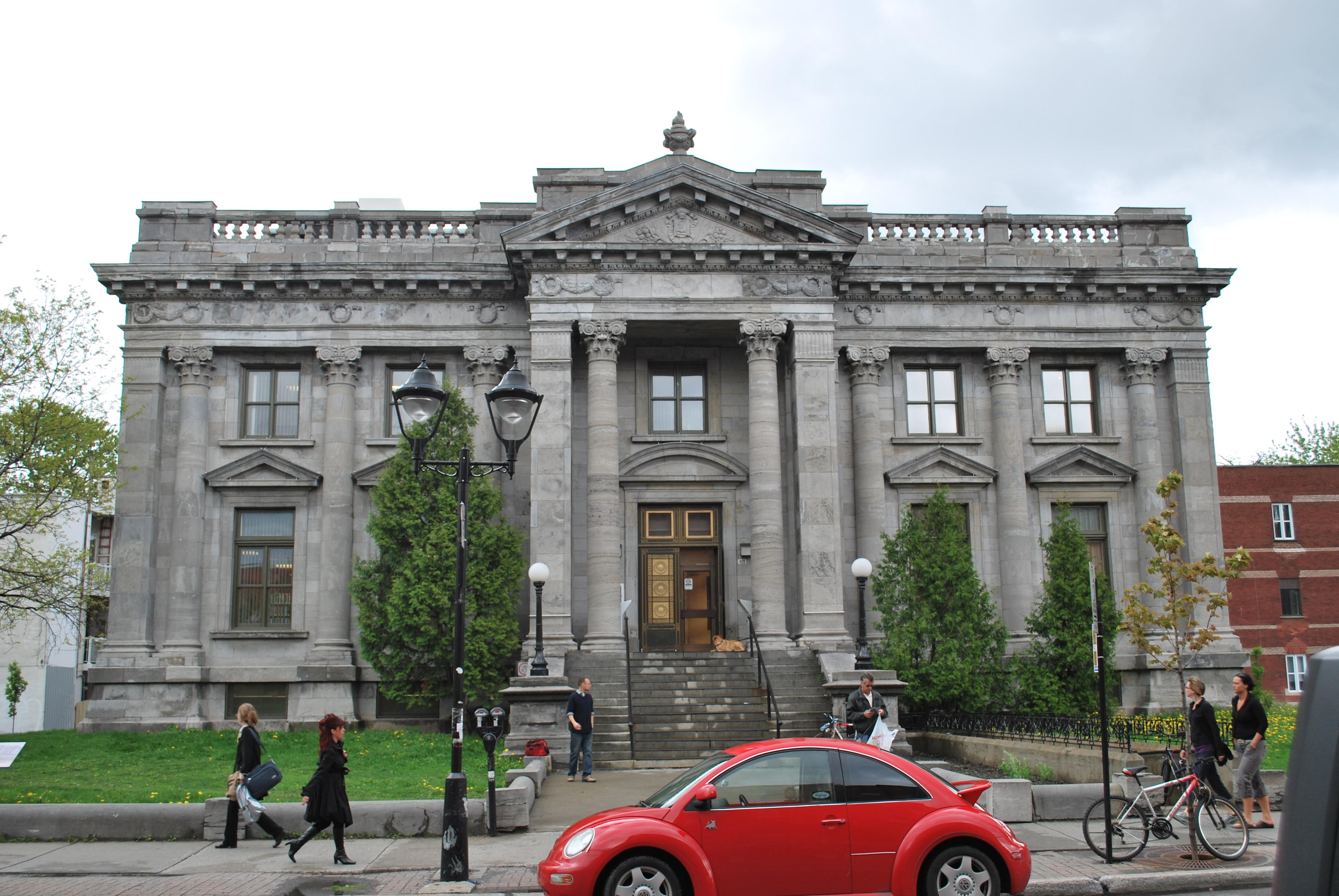 Bibliothèque de Maisonneuve, à Montréal.